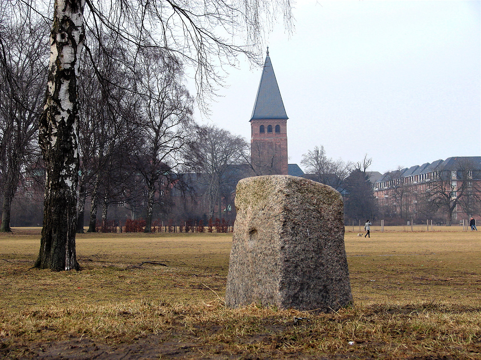 Milestenen (kvartmilesten), Ole Rømer, 1698, Fælledparken ved Øster Allé, i nærheden af Struensee og Brandts henrettelsessted, København